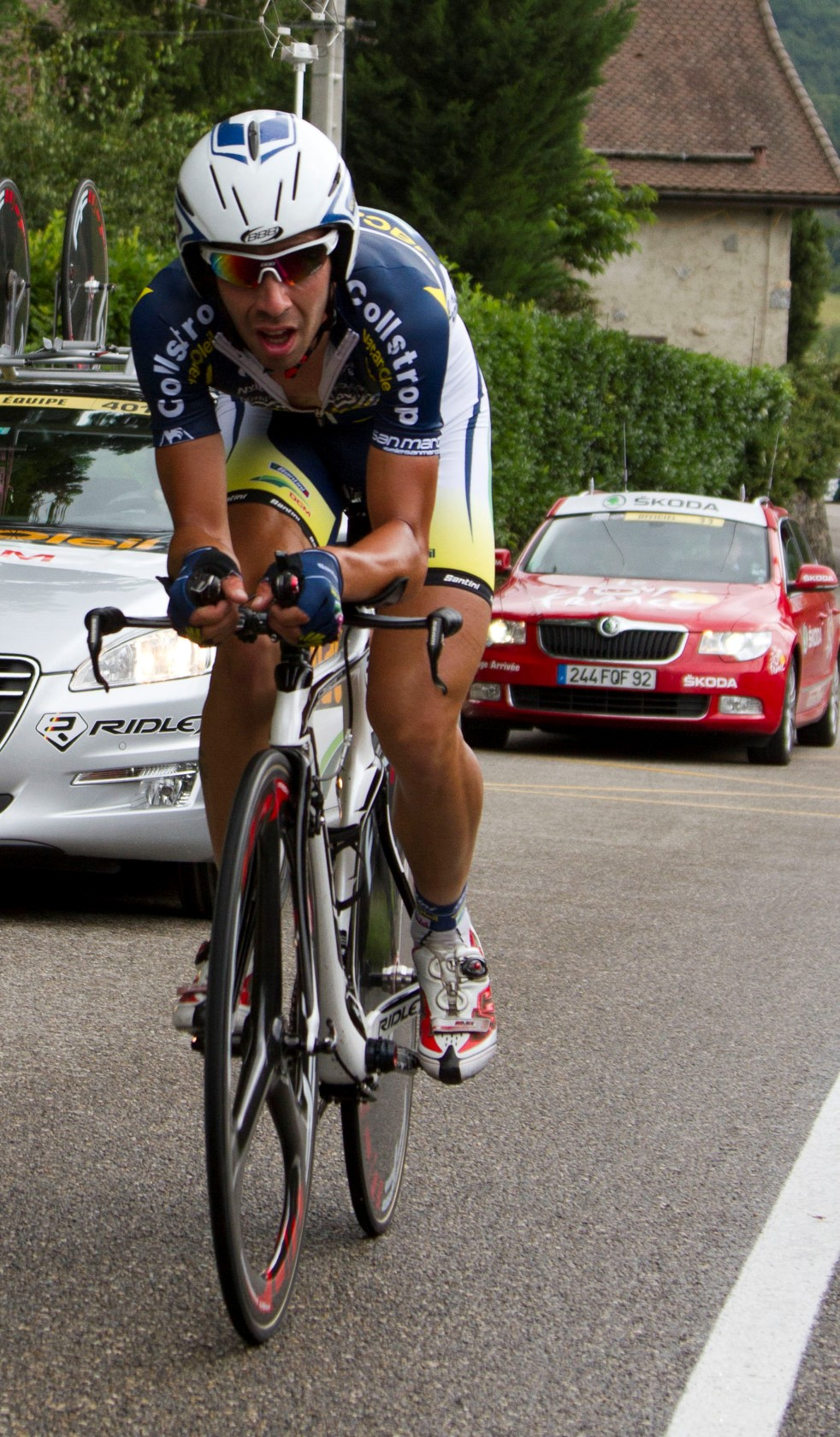 tijdrit 065 de gendt